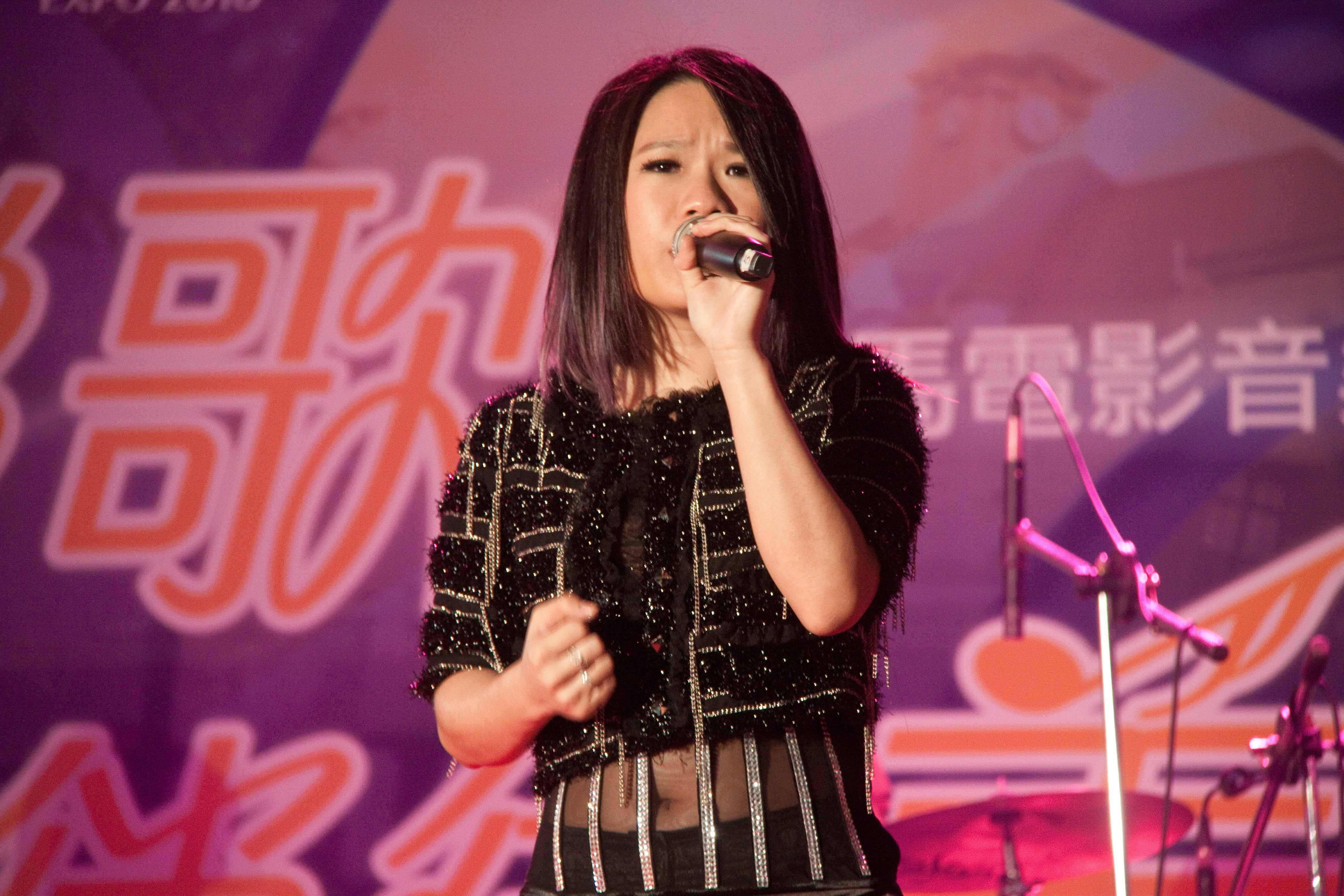 臺灣鐵路管理局新竹車站站前廣場 金馬電影音樂會：西洋影歌‧徜徉美樂地 符瓊音演唱